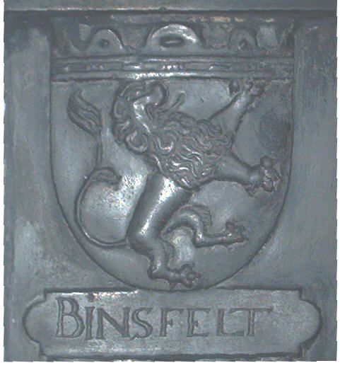 Wappen Binsfeld bei Nörvenich 2001-08-01